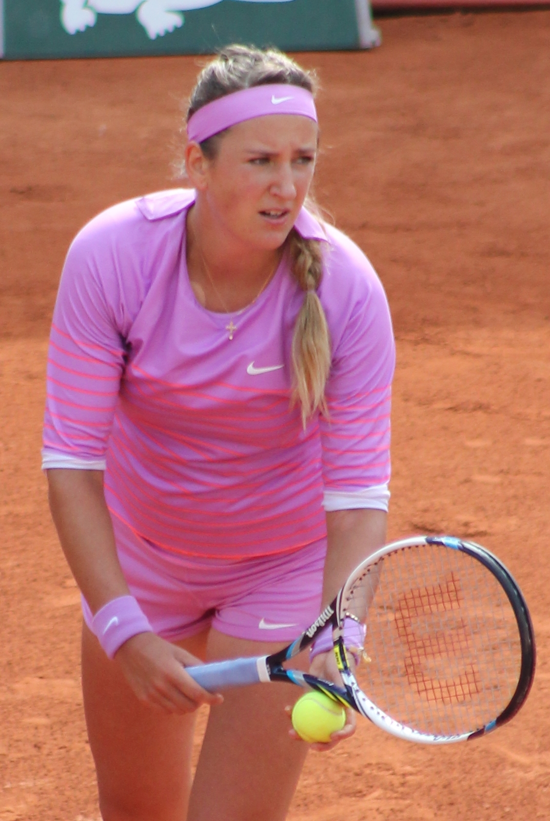 Azarenka RG15 (30)